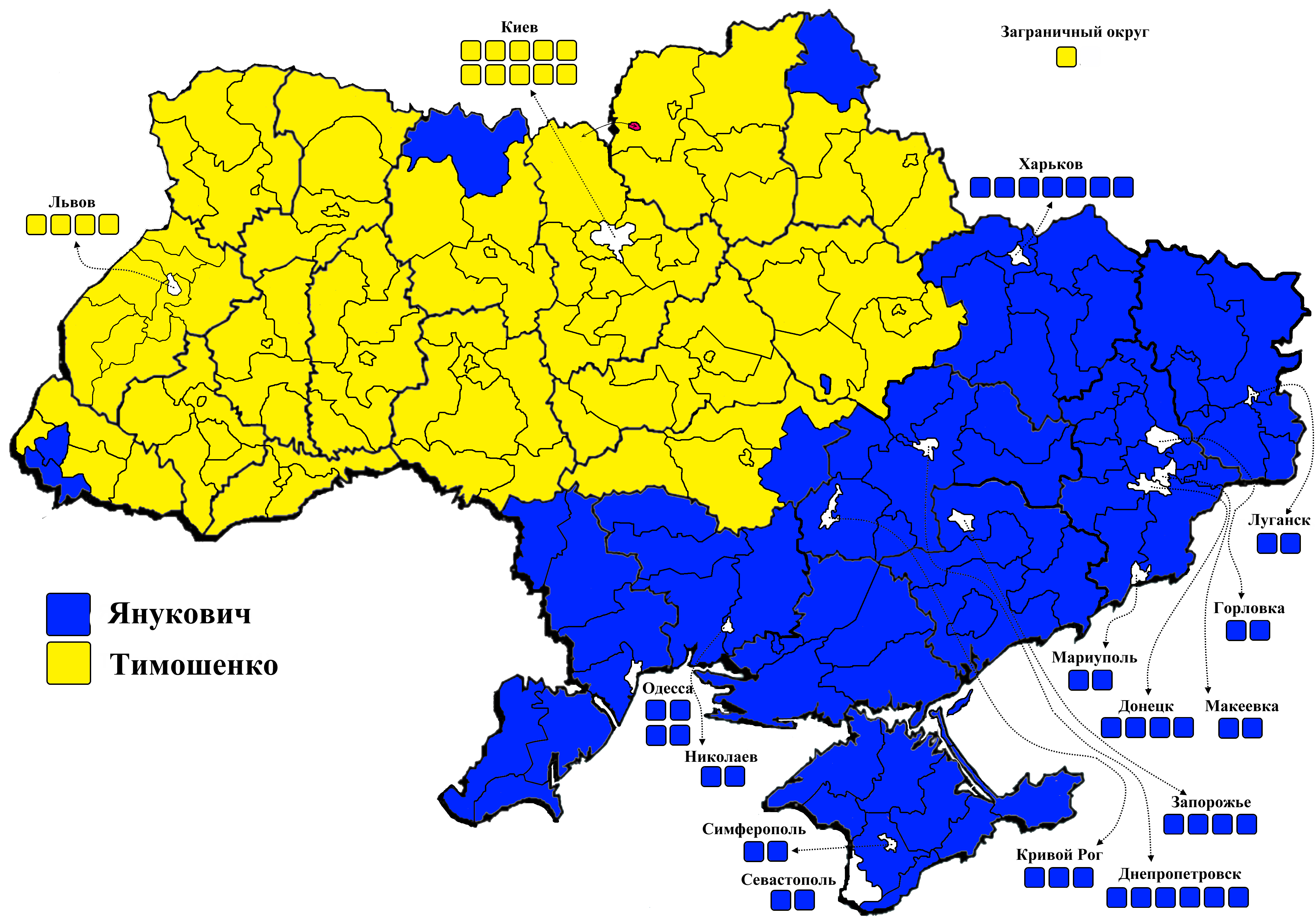 Первые места по округам. Второй тур.